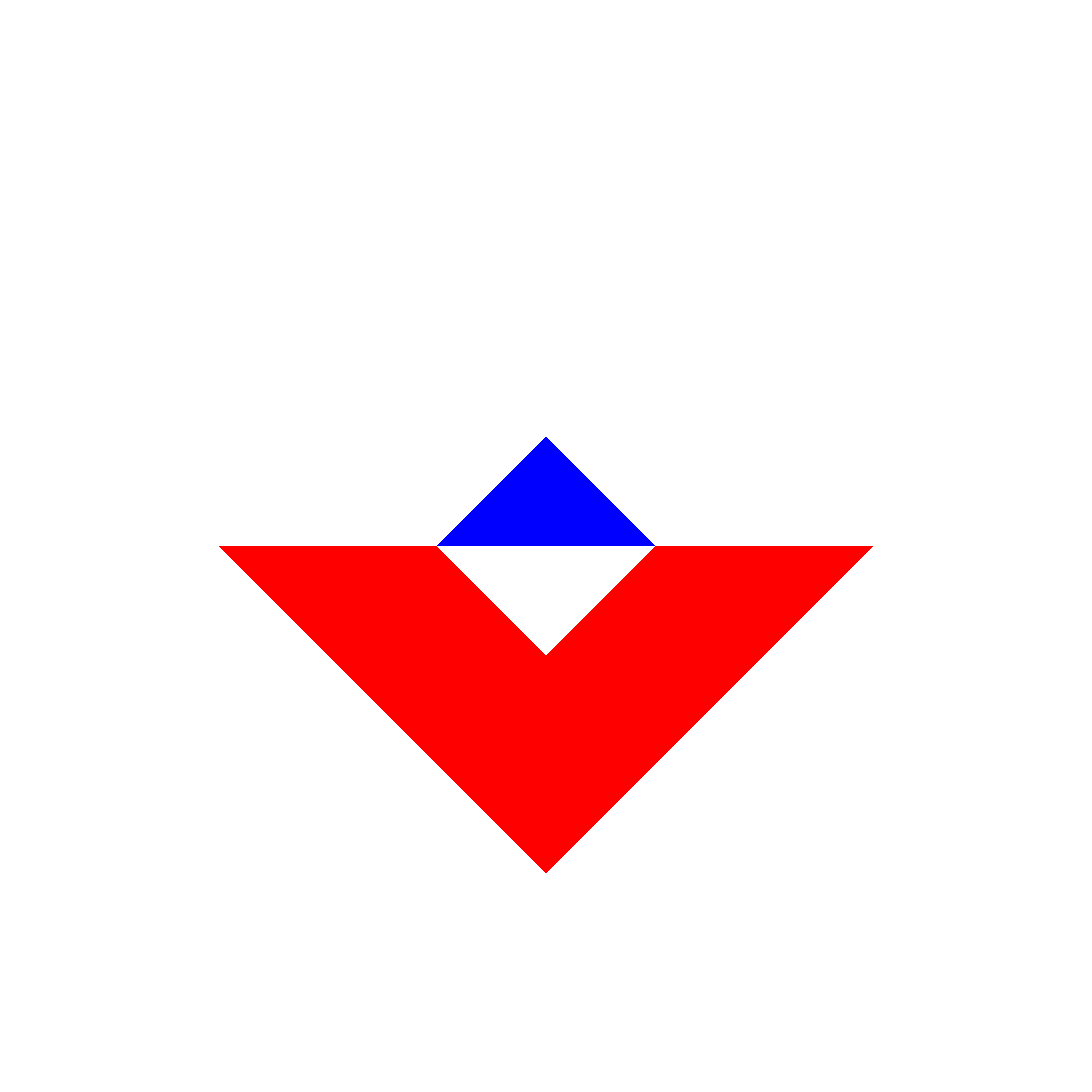 Religionssymbol